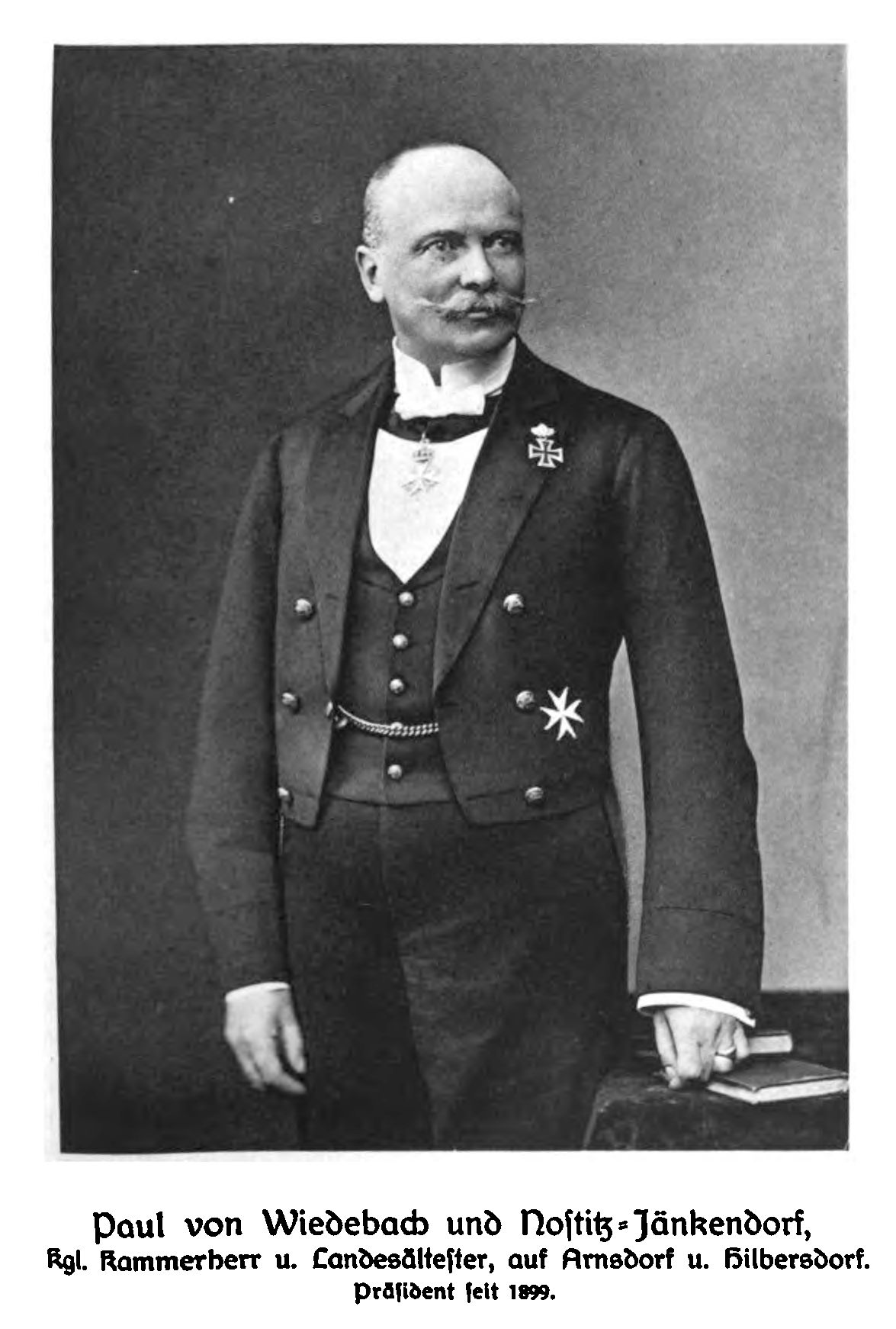 Paul von Wiedebach und Nostitz-Jänkendorf (1848-1923), in: Neues lausitzisches Magazin, Band 80.